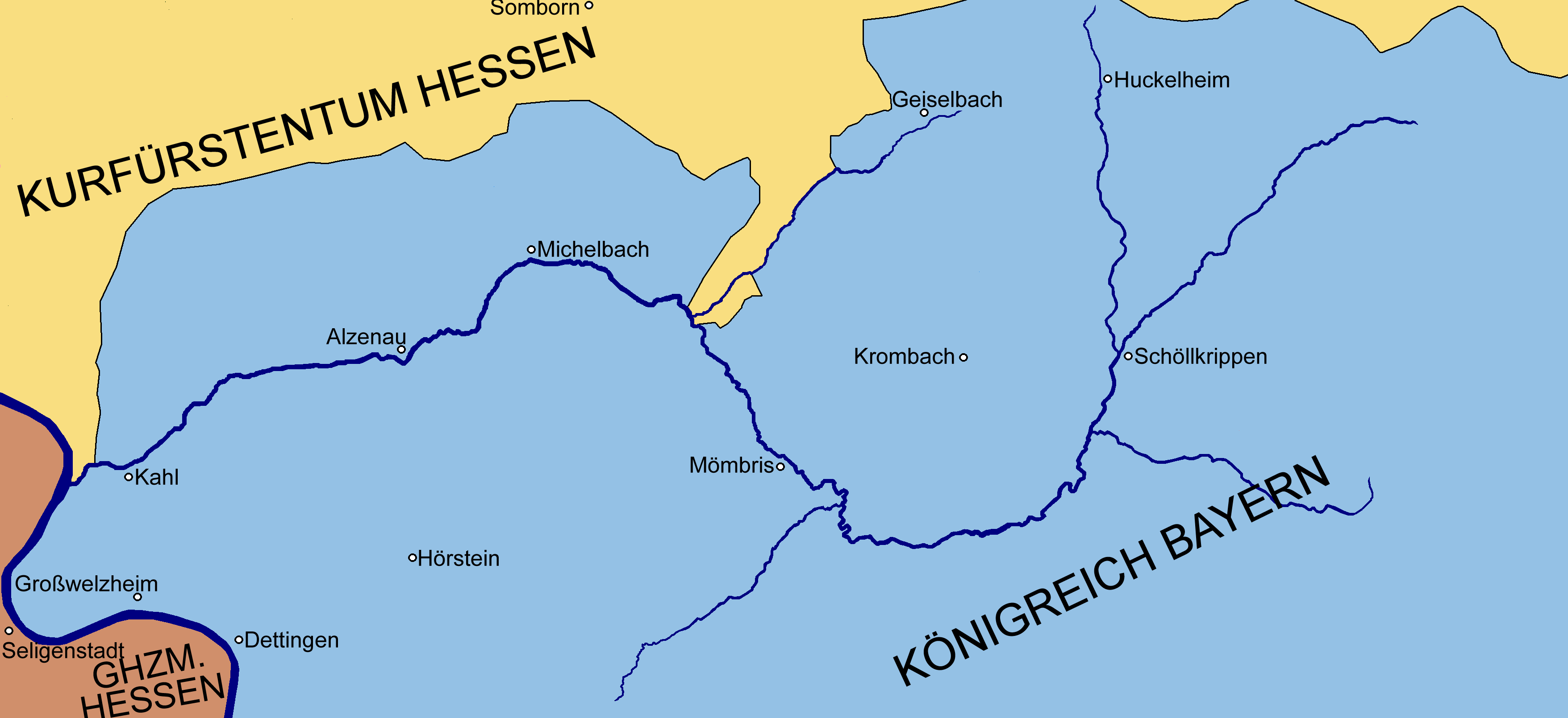 Die politische Zugehörigkeit des Kahlgrundes um 1840. Der Grenzverlauf der historischen Territorien kann stark abweichend dargestellt sein. Die Zugehörigkeit einiger Dörfer konnte nicht exakt nachgewiesen werden. Die Ortsnamen wurden in ihrer heutigen Namensform eingetragen.